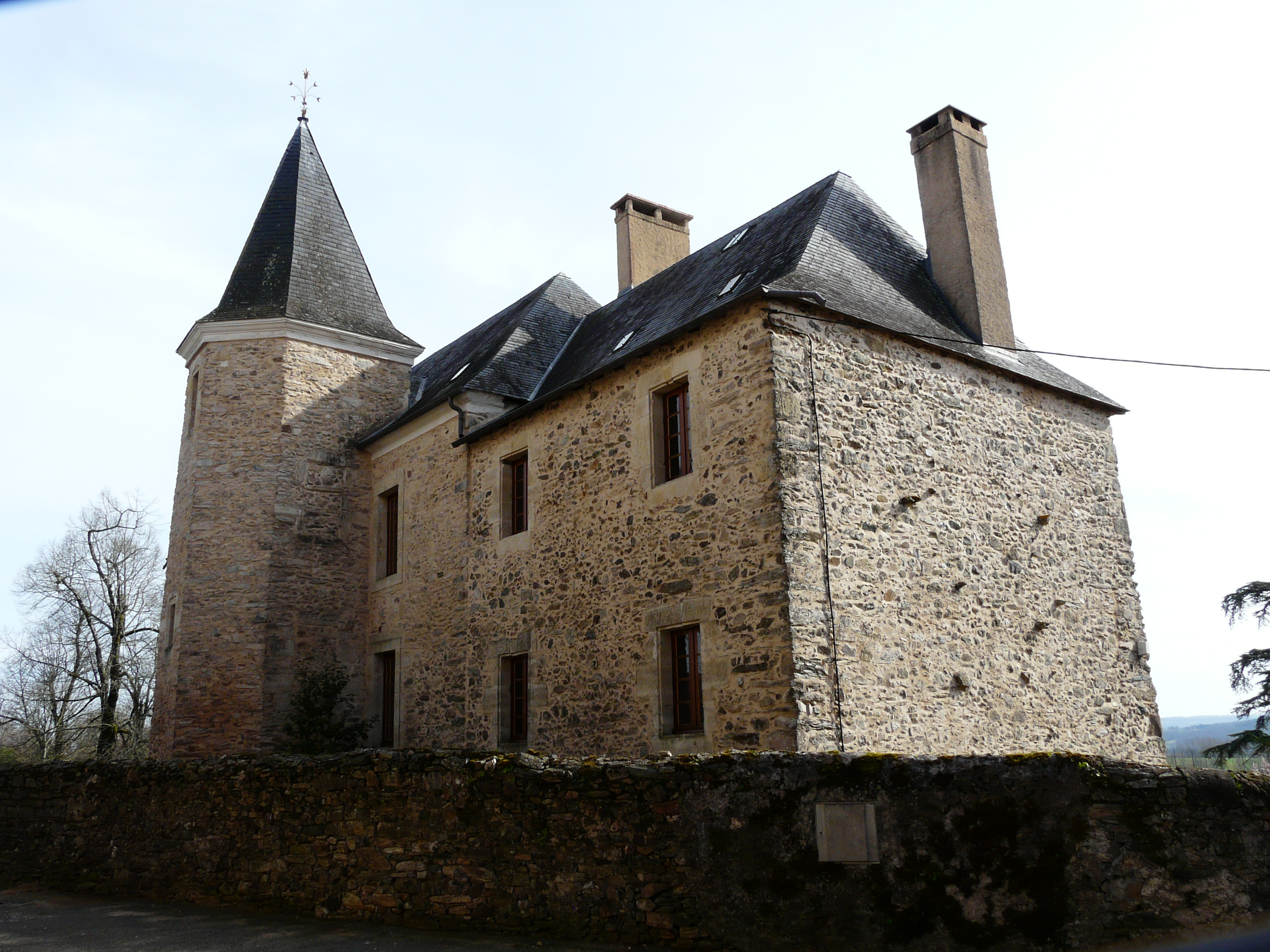 Le manoir de la Falesie, Génis, Dordogne, France